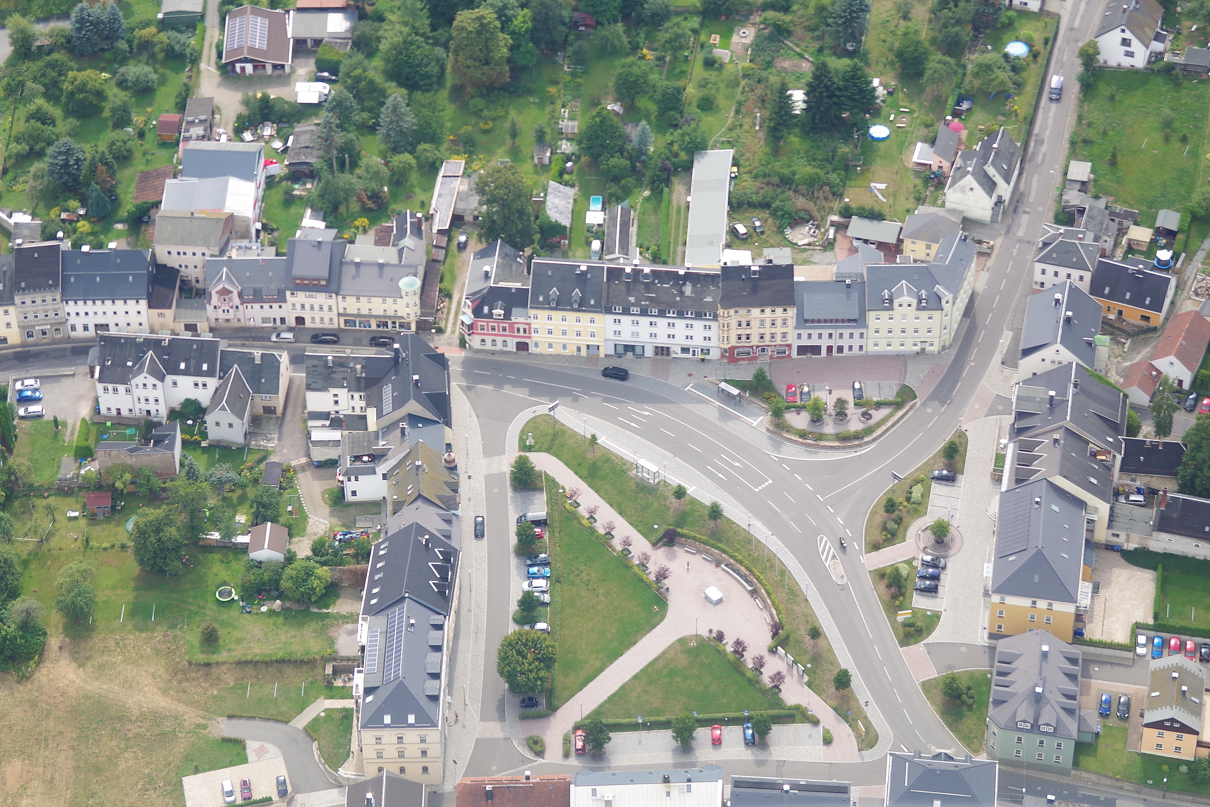 Marktplatz von Pockau im Erzgebirge